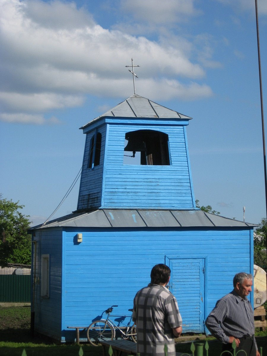 Нясвіж. Свята-Георгіеўская царква. Капліца